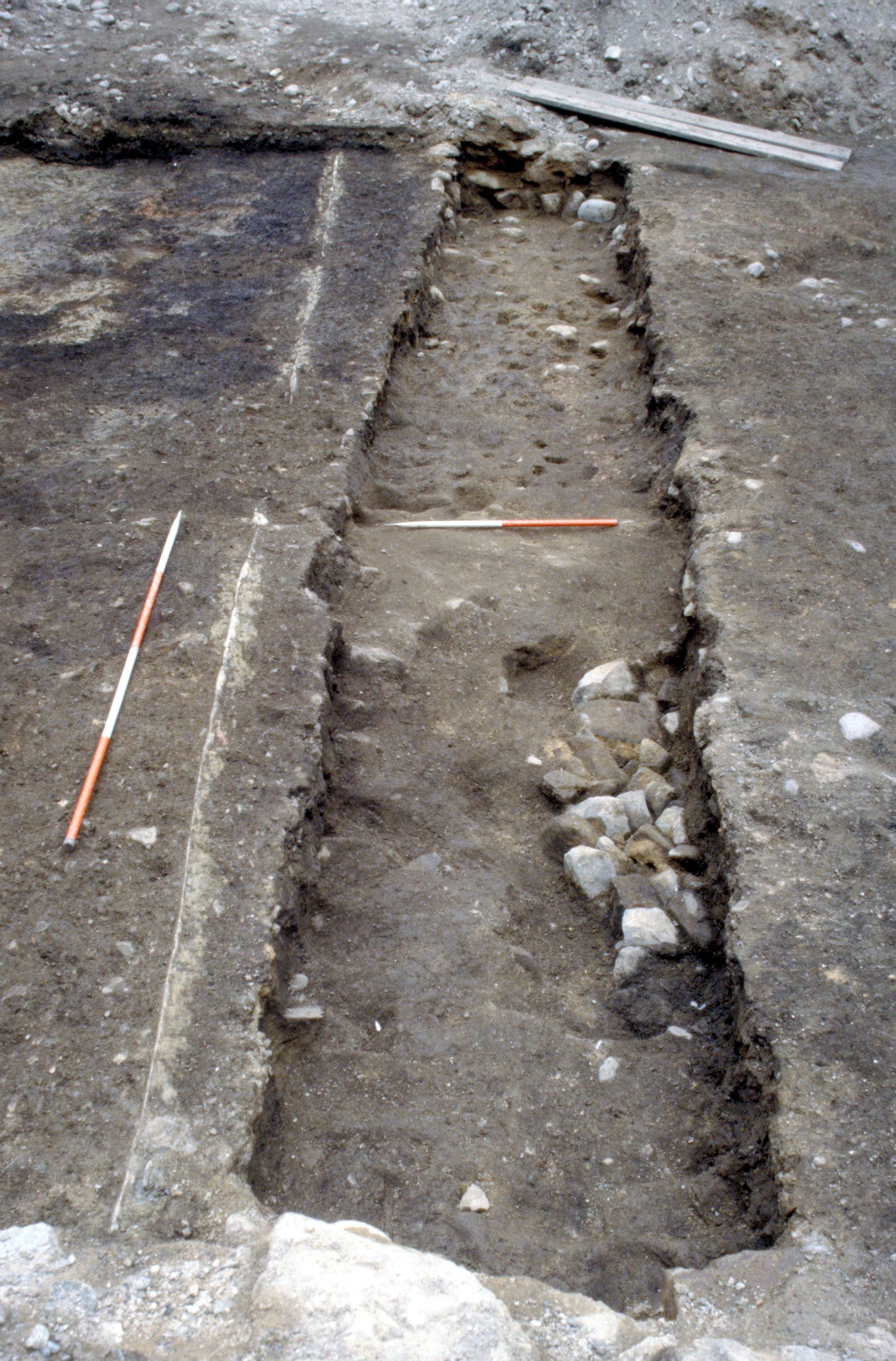 Uitbraaksleuf bij de opgraving van Aberdeen's_Carmelite_Friary,_1980-1994 (robber trench)